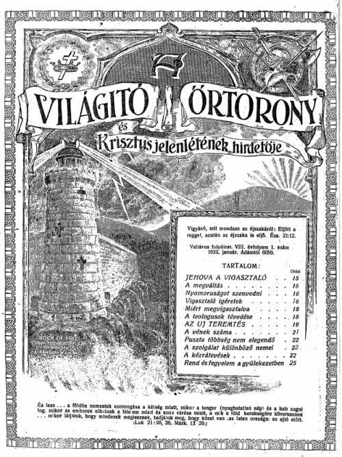 Strażnica w języku węgierskim wydanie amerykańskie (styczeń 1922, rok VIII)